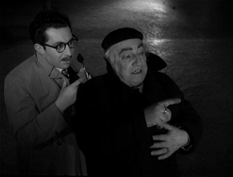 Screenshot del film I vitelloni (1953)